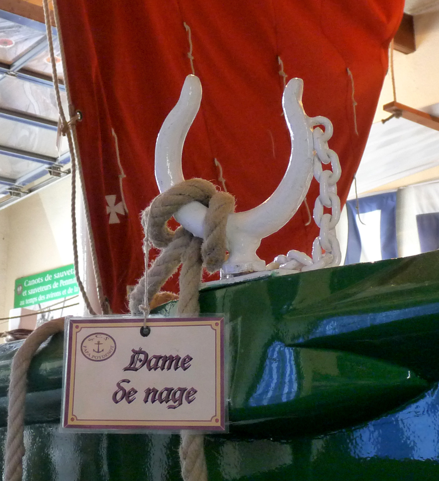 "Dame de nage" du Papa Poydenot, canot de sauvetage de 1900 reconstitué (phare d'Eckmühl, Finistère, Bretagne)